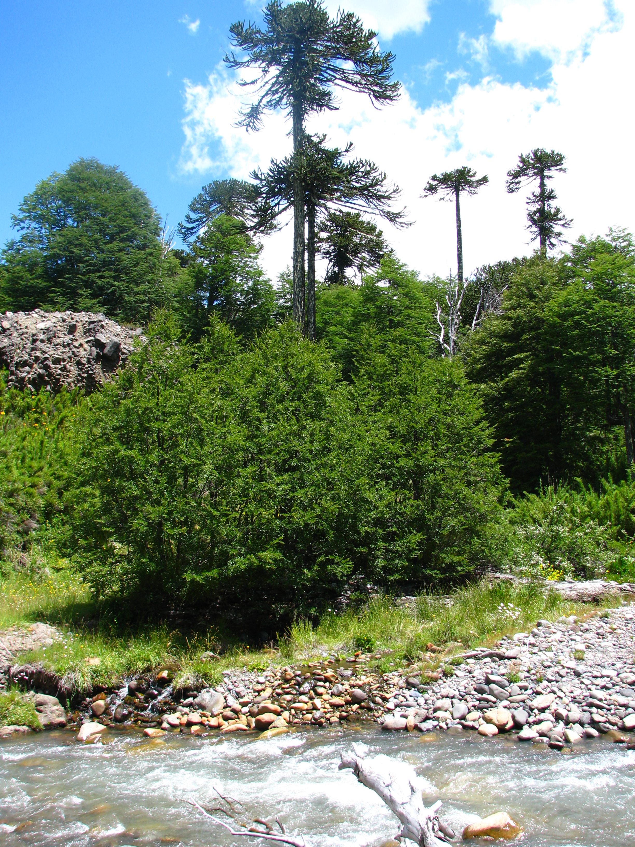 Araucaria araucana y Nothofagus antarctica, Río Nalcas en Reserva Nacional Nalcas